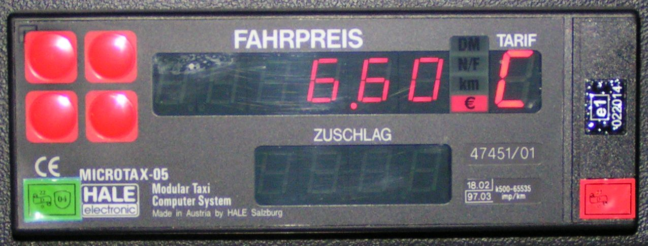 Taxameter Deutschland Fotograf: Stefan Kühn